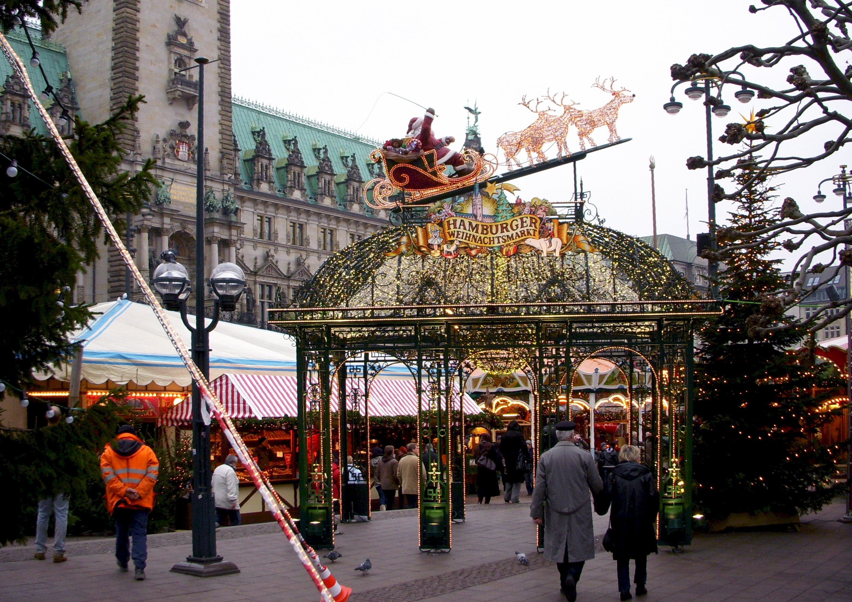 Weihnachtsmarkt auf dem Rathausplatz in Hamburg